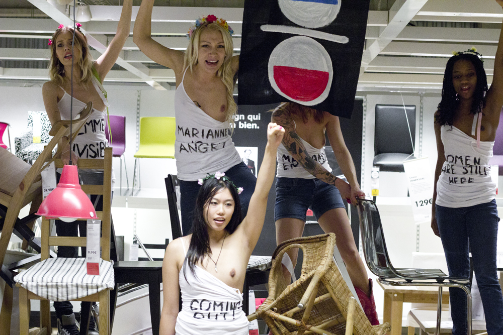 Femen protest againt IKEA in Paris, France. oct. 26 - 2012 josephparis.fr/